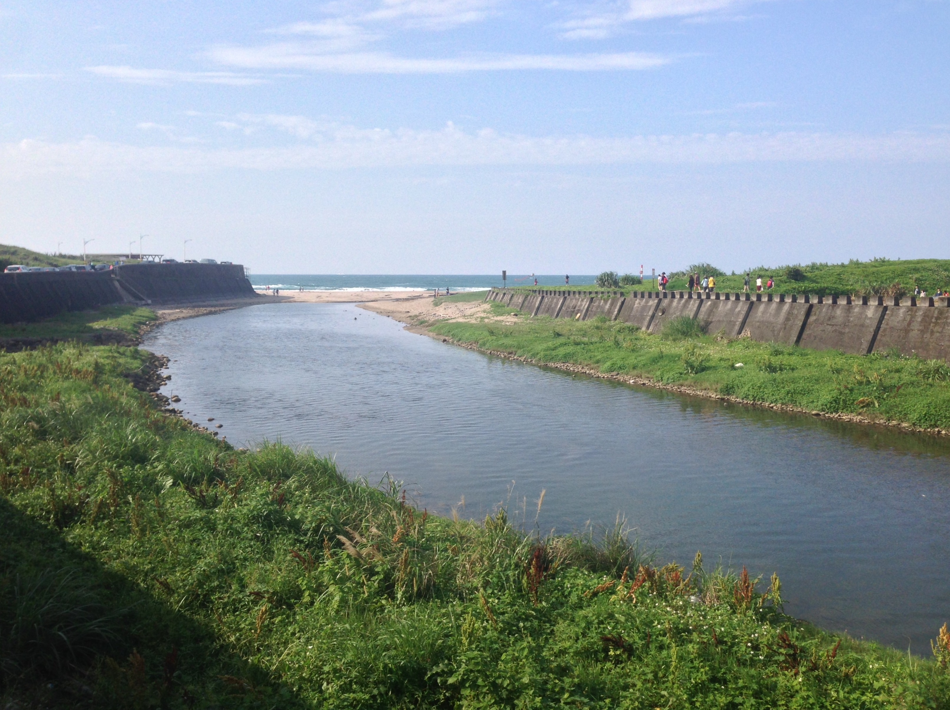 中文（台灣）: 大溪墘溪出海口